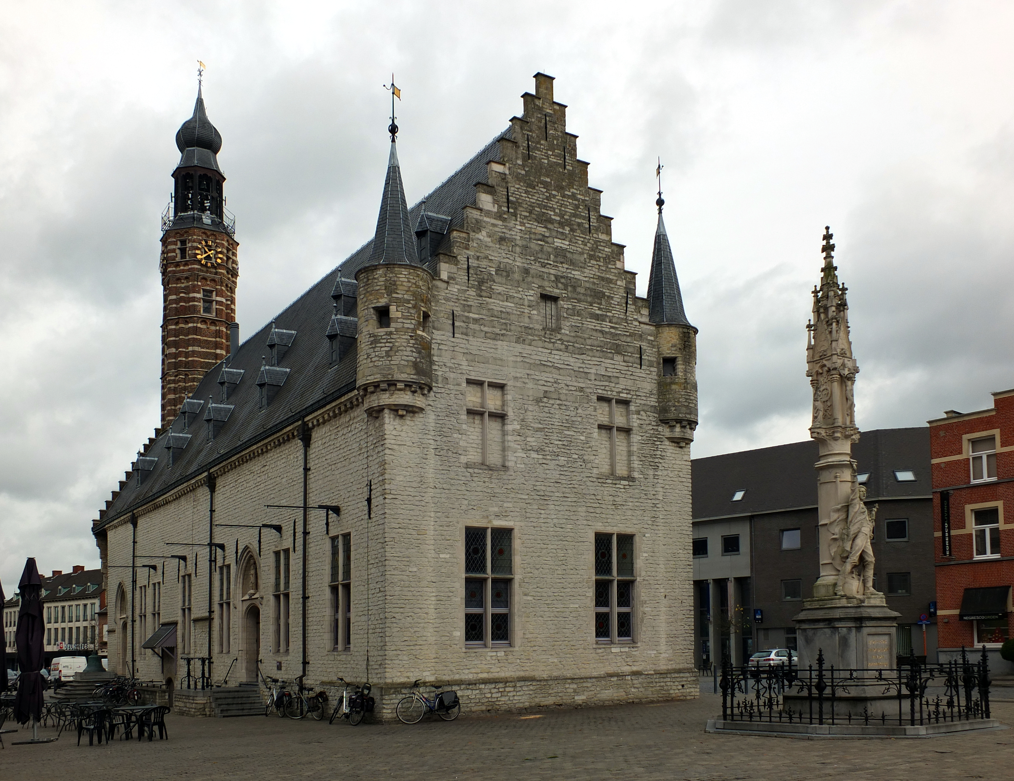 Boerenkrijgmonument te Herentals, aan de zuidzijde van de Lakenhalle. Het ruim vier meter hoge monument herinnert aan de slag bij Herentals op zondag 28 oktober 1798, één van de bloedigste episodes uit de opstand tegen het Franse regime. Het monument werd ontworpen door Ernest Dieltjens en onthuld in 1898.